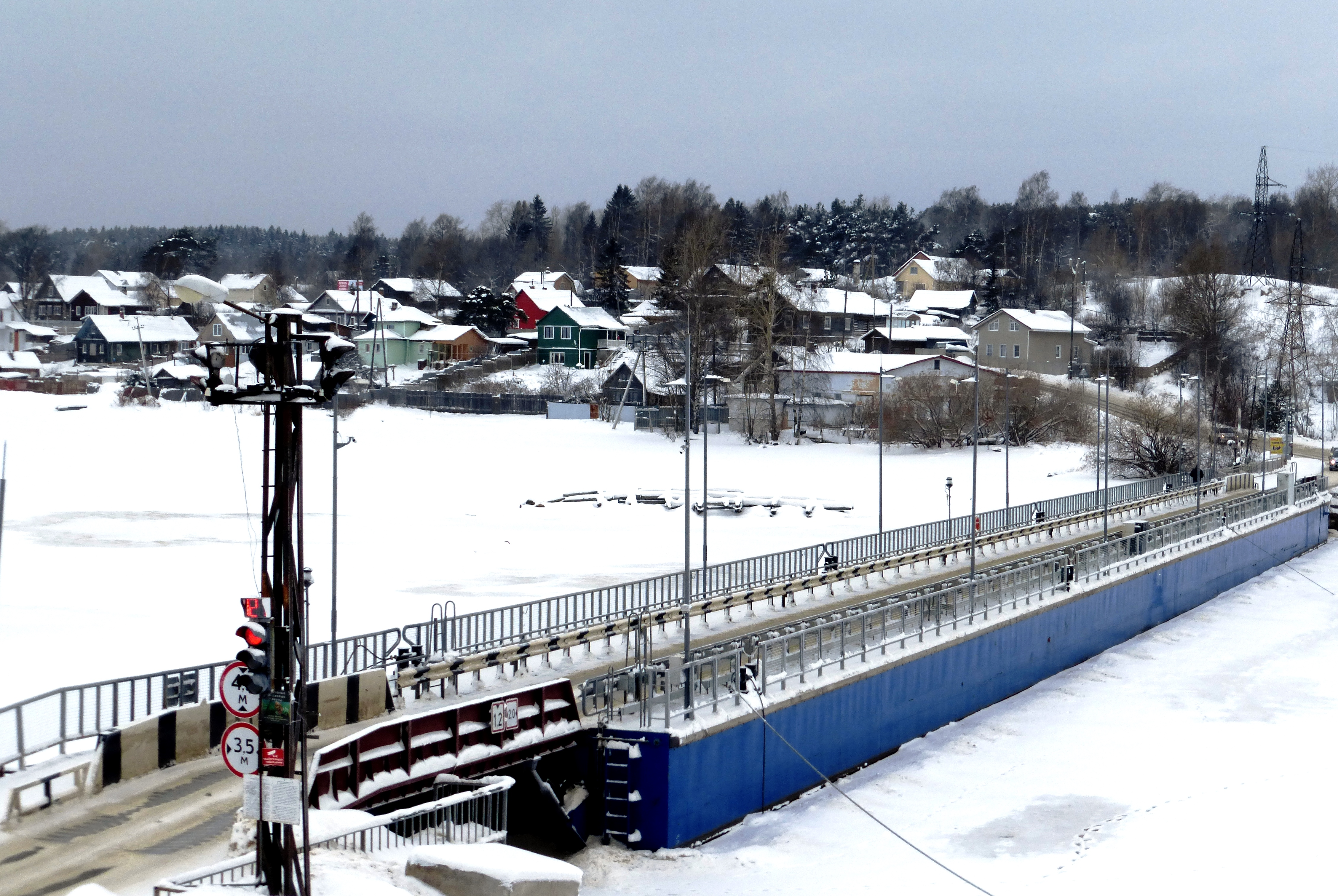 Понтонный мост в Соломенном (Петрозаводск, Ялгубское шоссе)